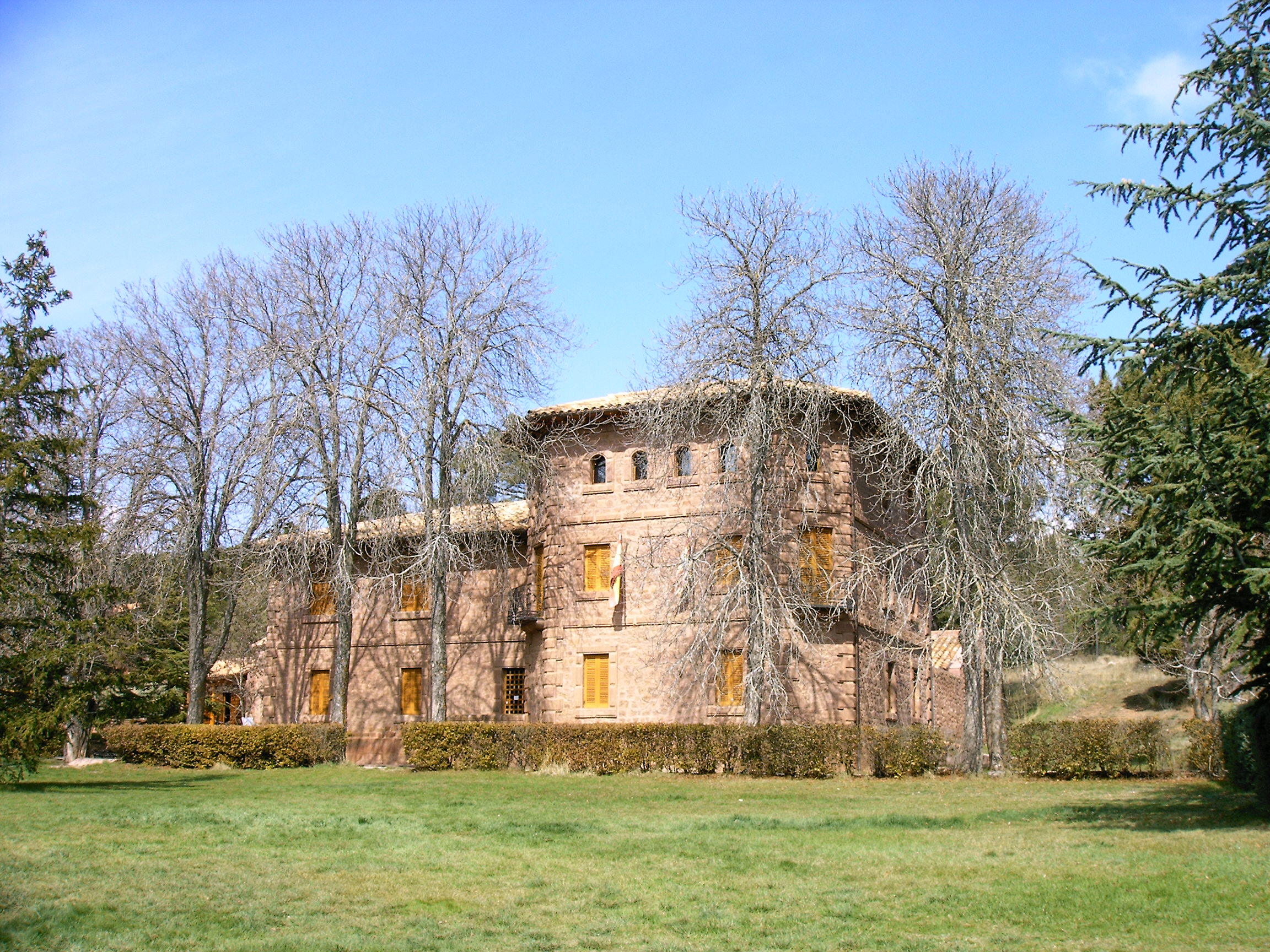 (Centro de Interpretación del Rodeno en BEZAS) en el Paraje Protegido del Rodeno